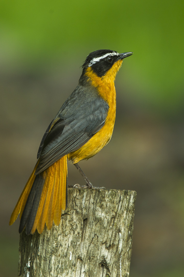 A Rüppel's robin-chat in Kenya - Kenya_S4E7933